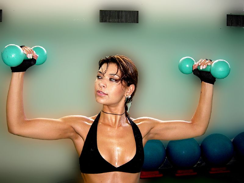 A modelo e apresentadora de TV brasileira Amanda Françozo.